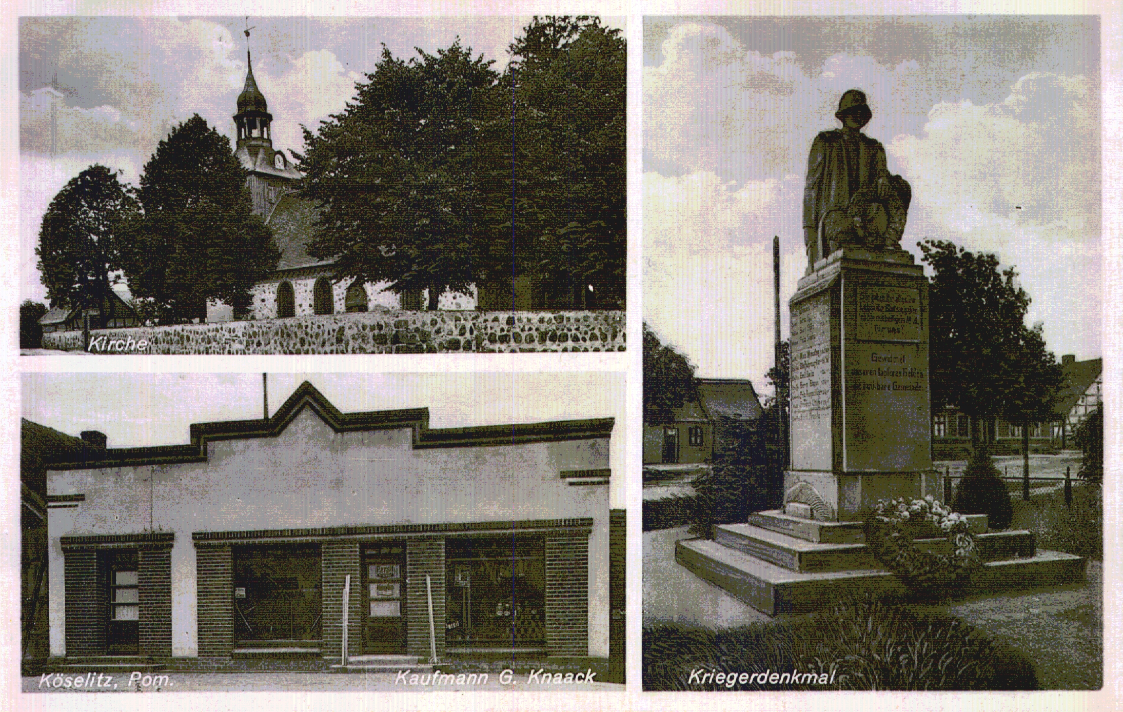 Koozielce koło Pyrzyc na przełomie XIX i XX wieku